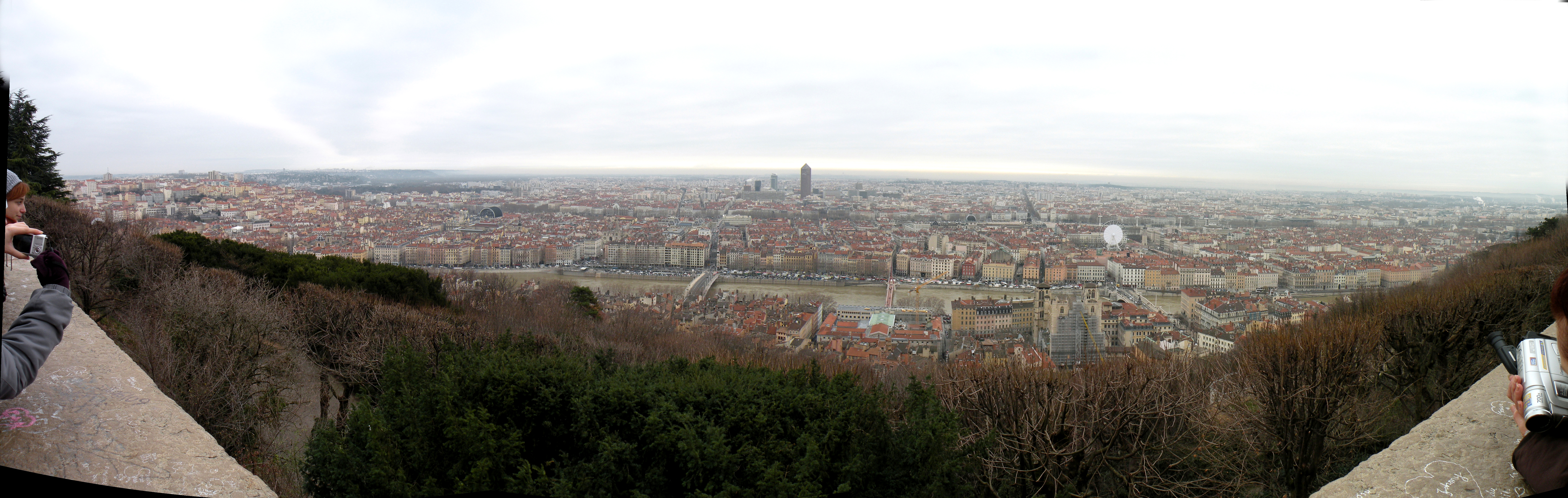 Лион. Вид с холма Фурвьер